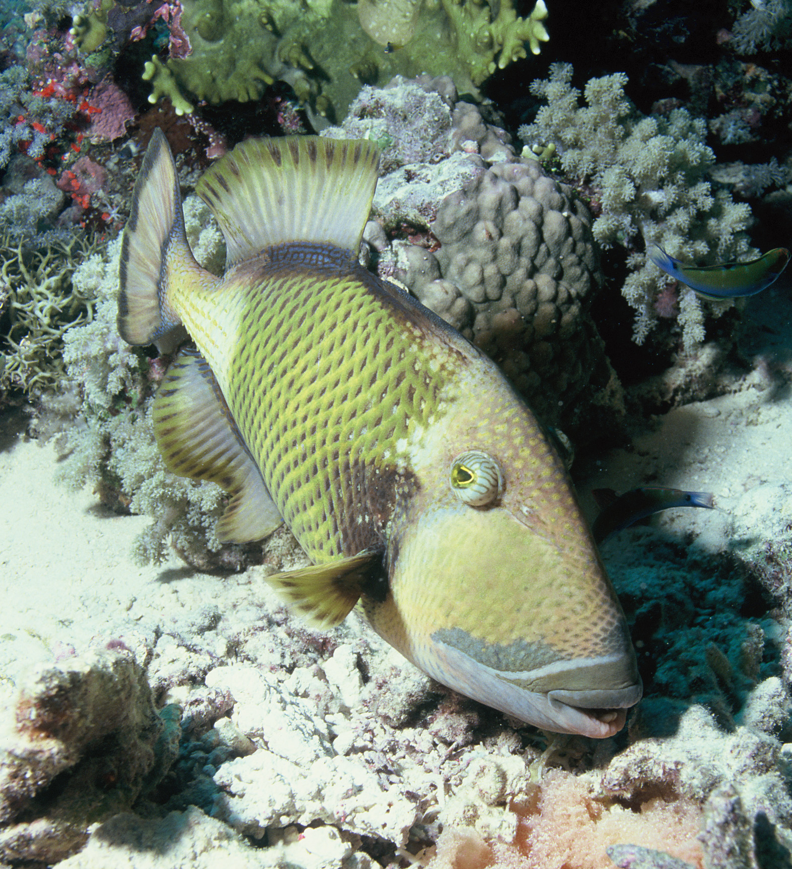 balistoides viridescens